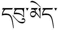 умэ тбт